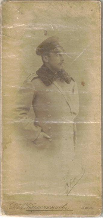 Ефтим Китанчев